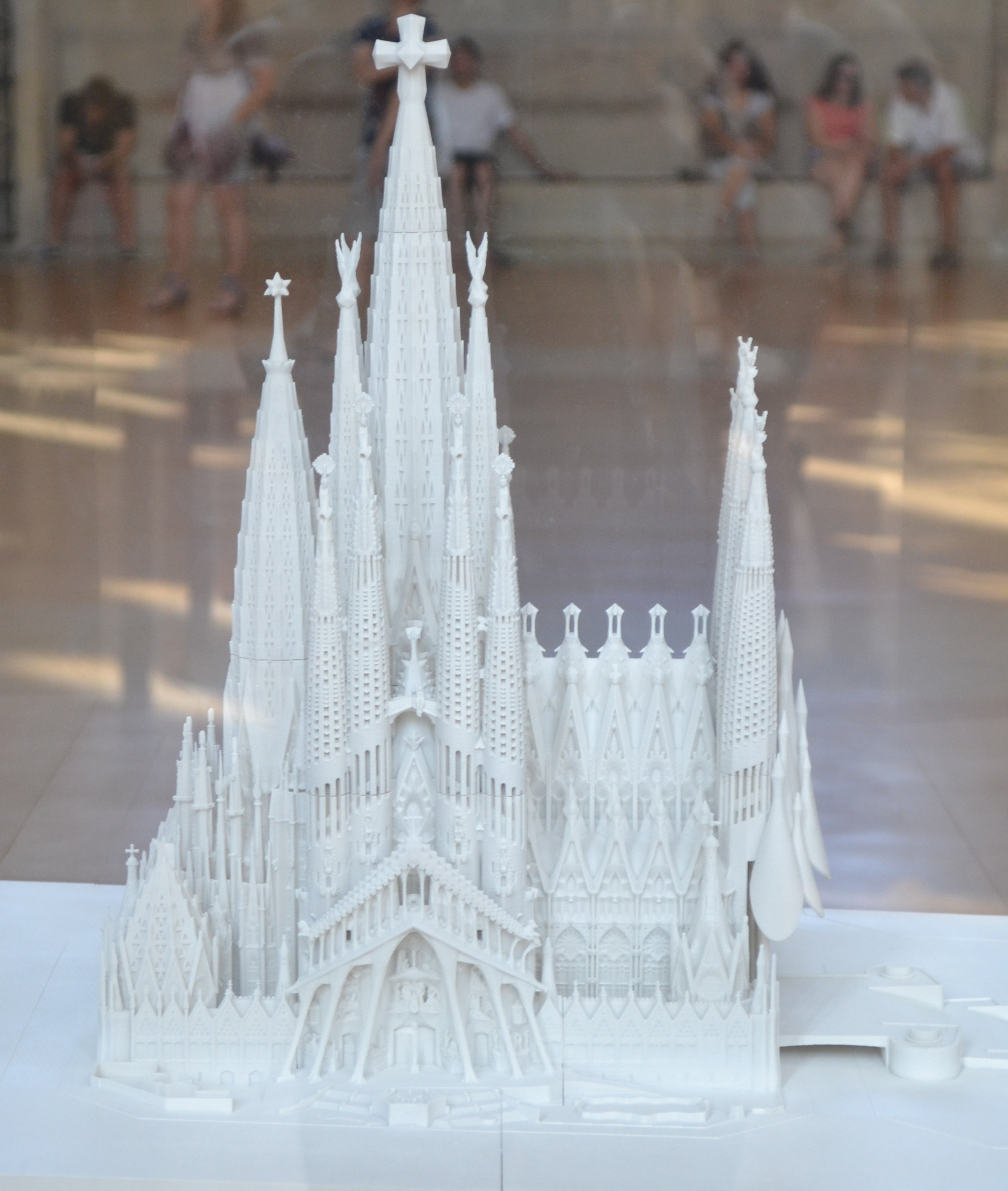 inside Sagrada familia